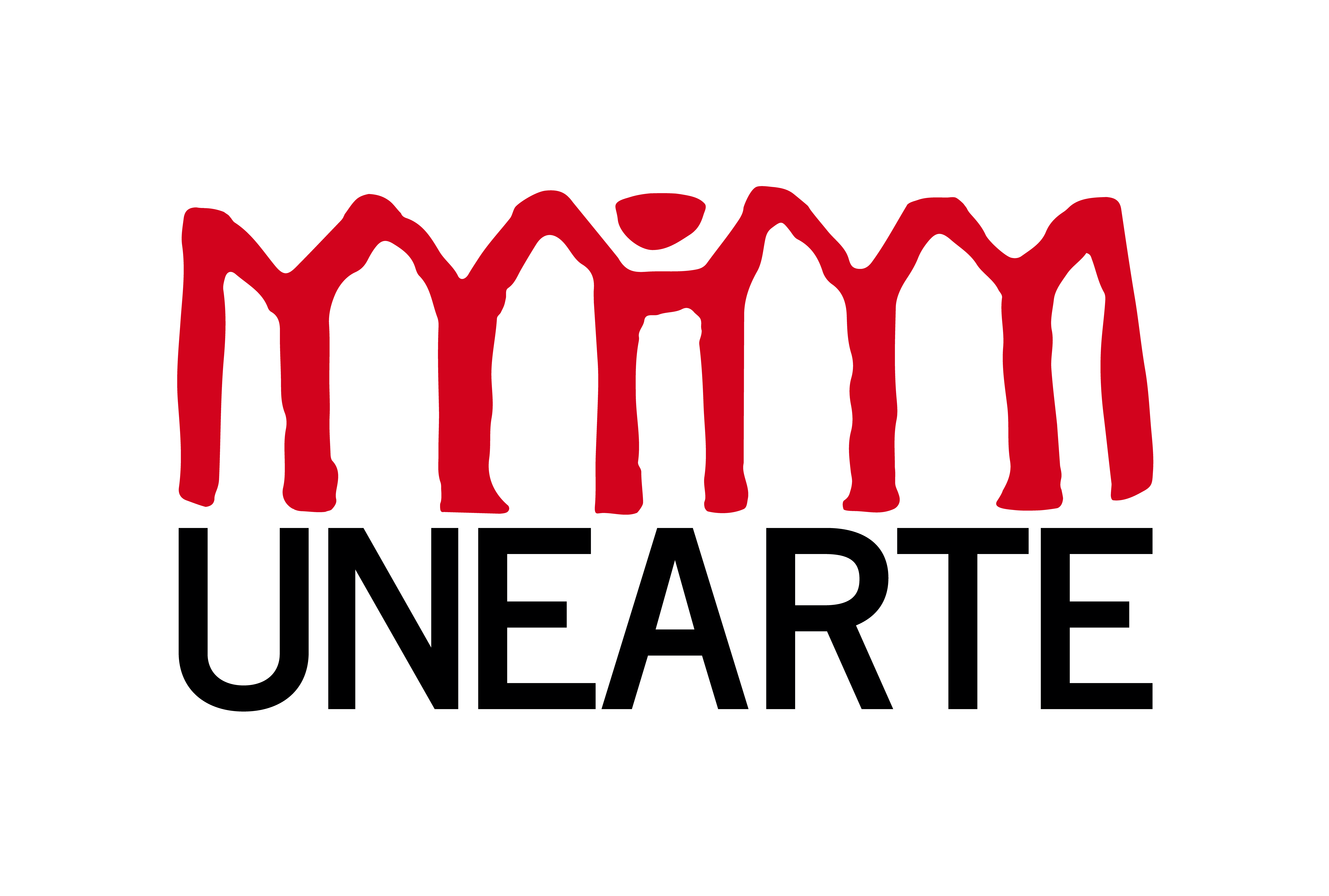 Creado por el maestro de artes plásticas y profesor Zacarías García.